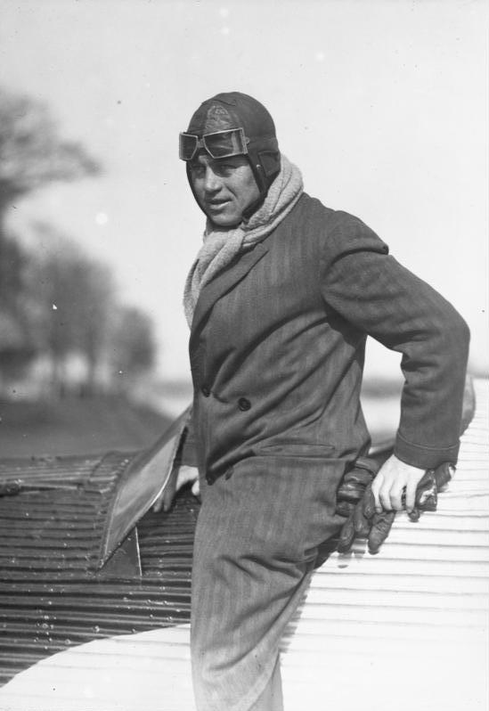 Der Chef-Pilot der Junkerswerke in Dessau Fritz Loose geht nach Amerika ! Fritz Loose, welcher 5 Weltrekorde eroberte, sollauf einer Parade internationaler Flugzeuge in Chicago deutsche Flugzeuge vorführen.